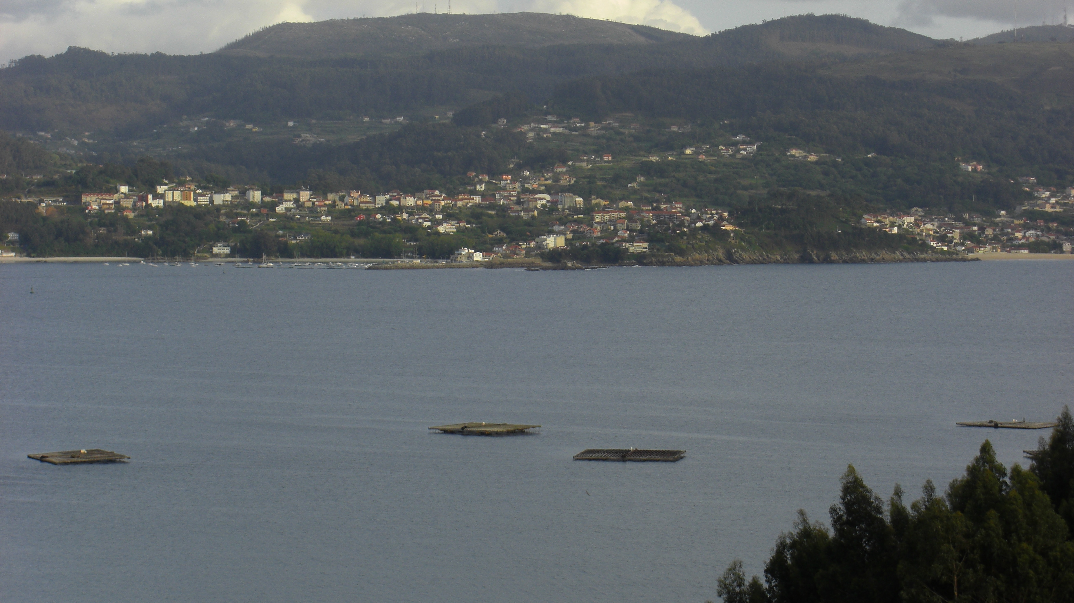 Varias bateas en una ría de Pontevedra (Galicia, España)